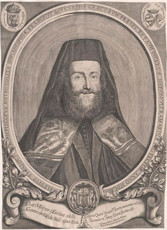 Meletios Typaldos (1648-1713), Metropolita di Filadelfia, Patriarca della comunità greca di Venezia